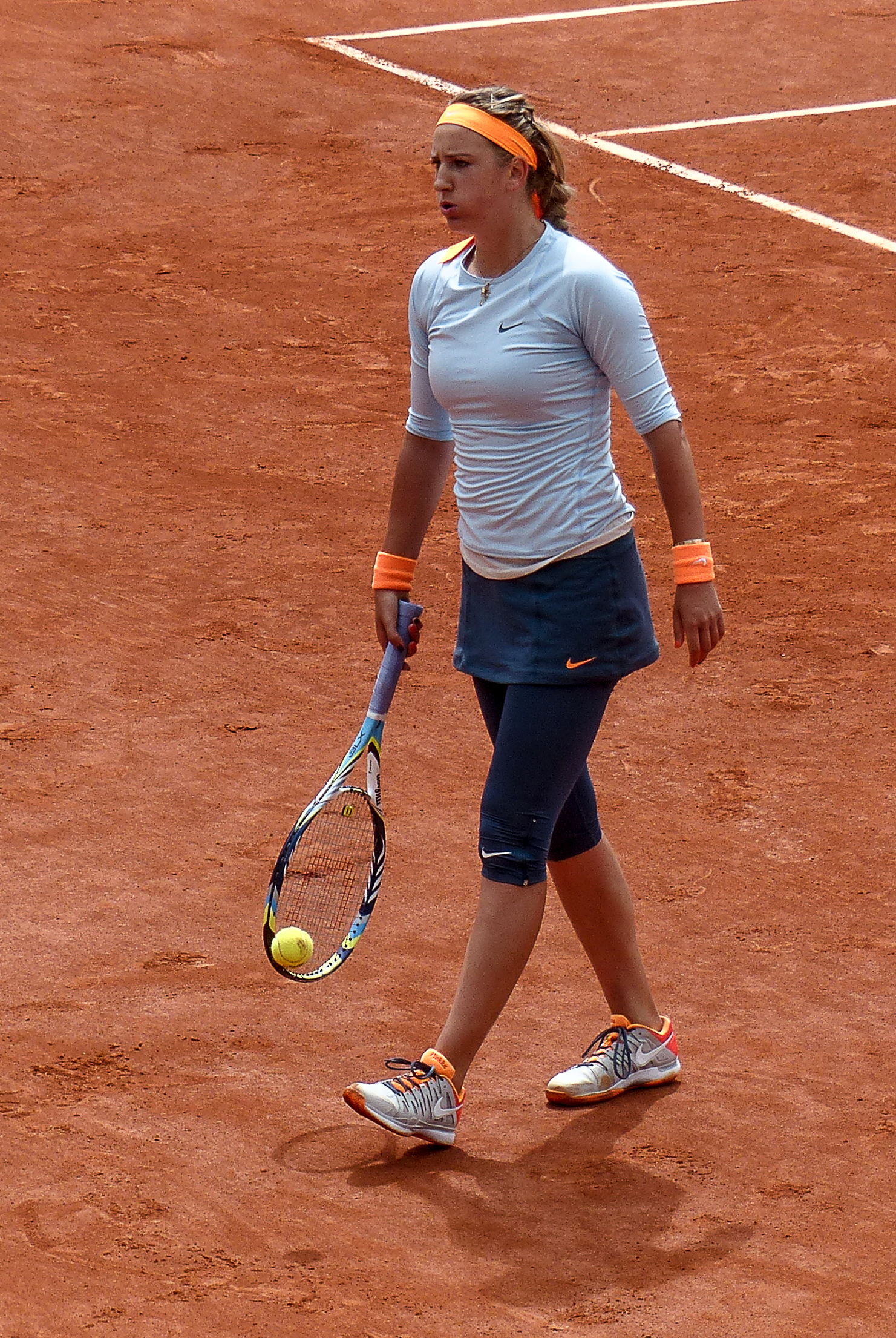 2ème tour Roland Garros 2013 : Victoria Azarenka (BLR) def. Elena Vesnina (RUS)